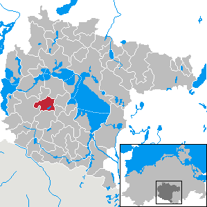 Walow im Landkreis Müritz, Mecklenburg-Vorpommern